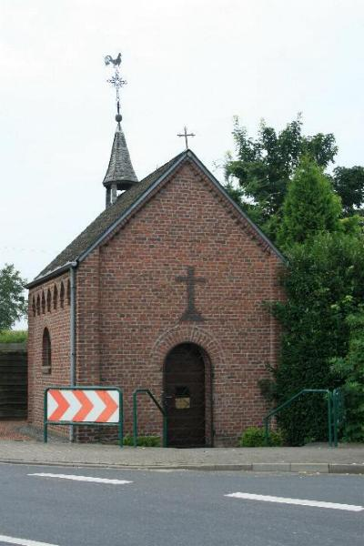 St. Brigidakapelle in Wegberg-Berg